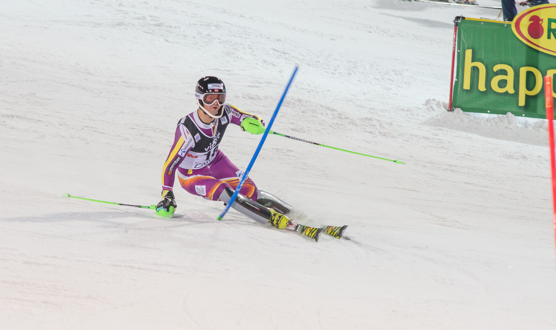 SOLEVAAG S.